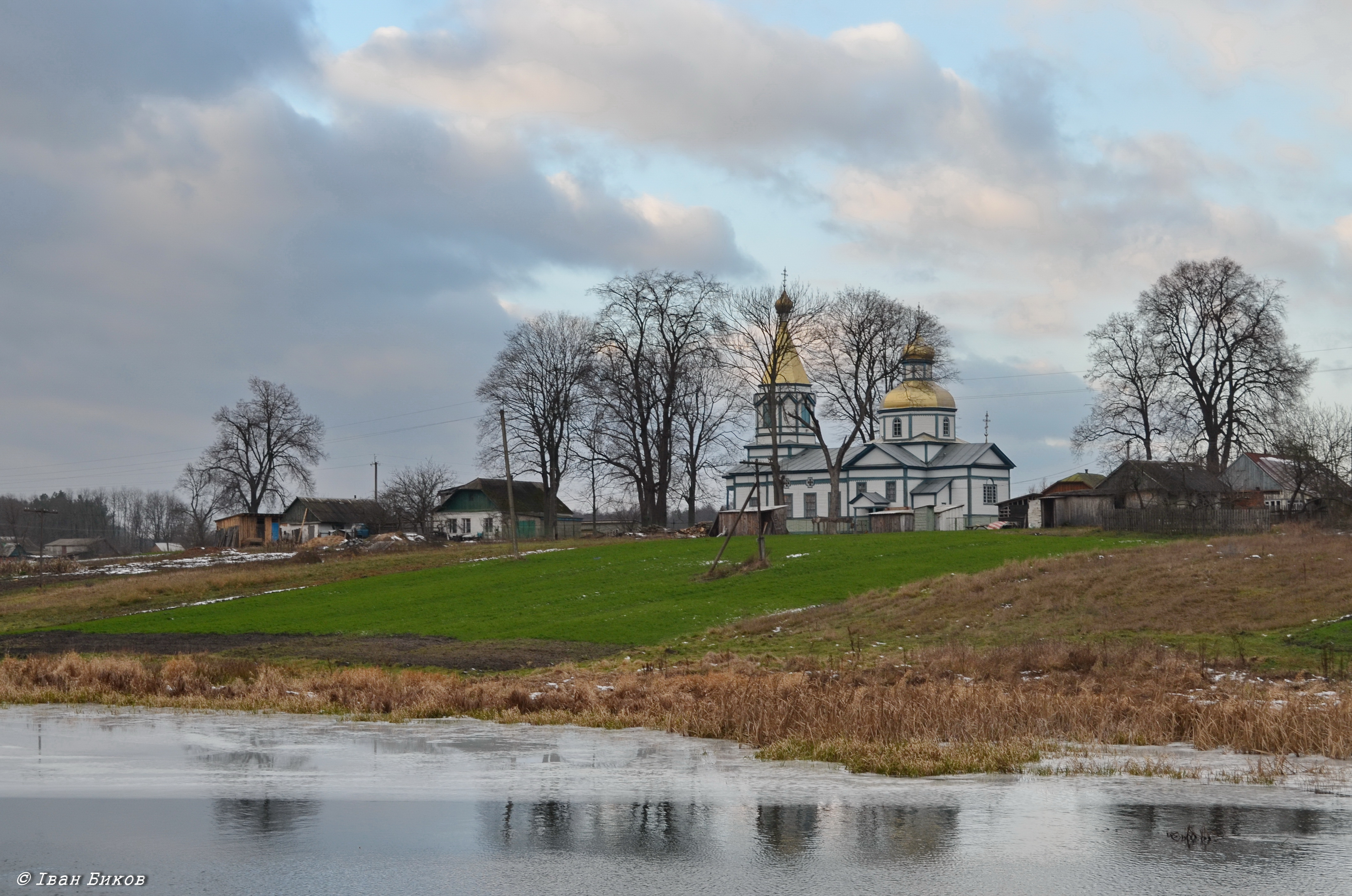 Миколаївська церква, с. Ворсівка, 1850 р.